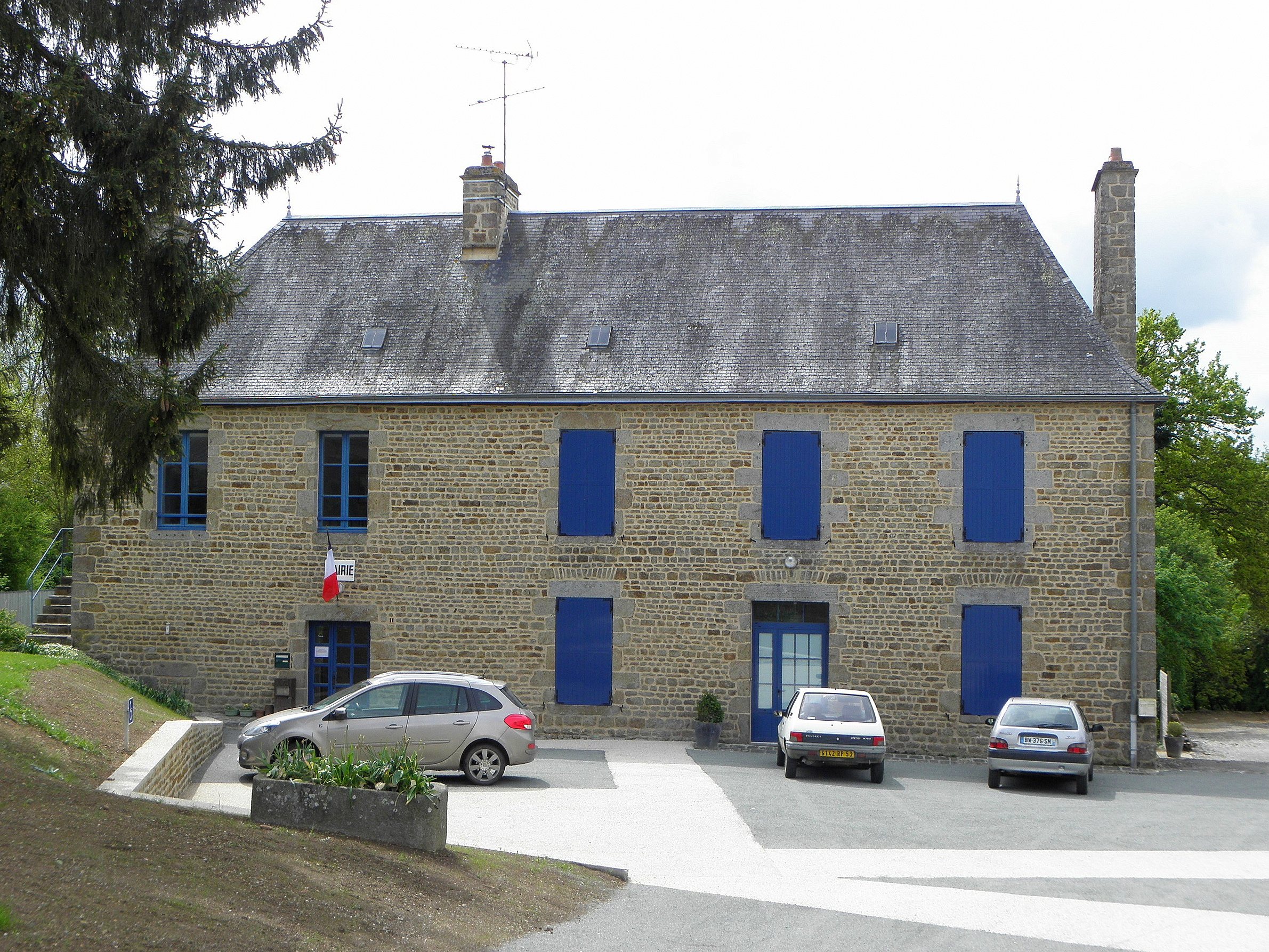 Mairie de Saint-Aubin-Fosse-Louvain (53).